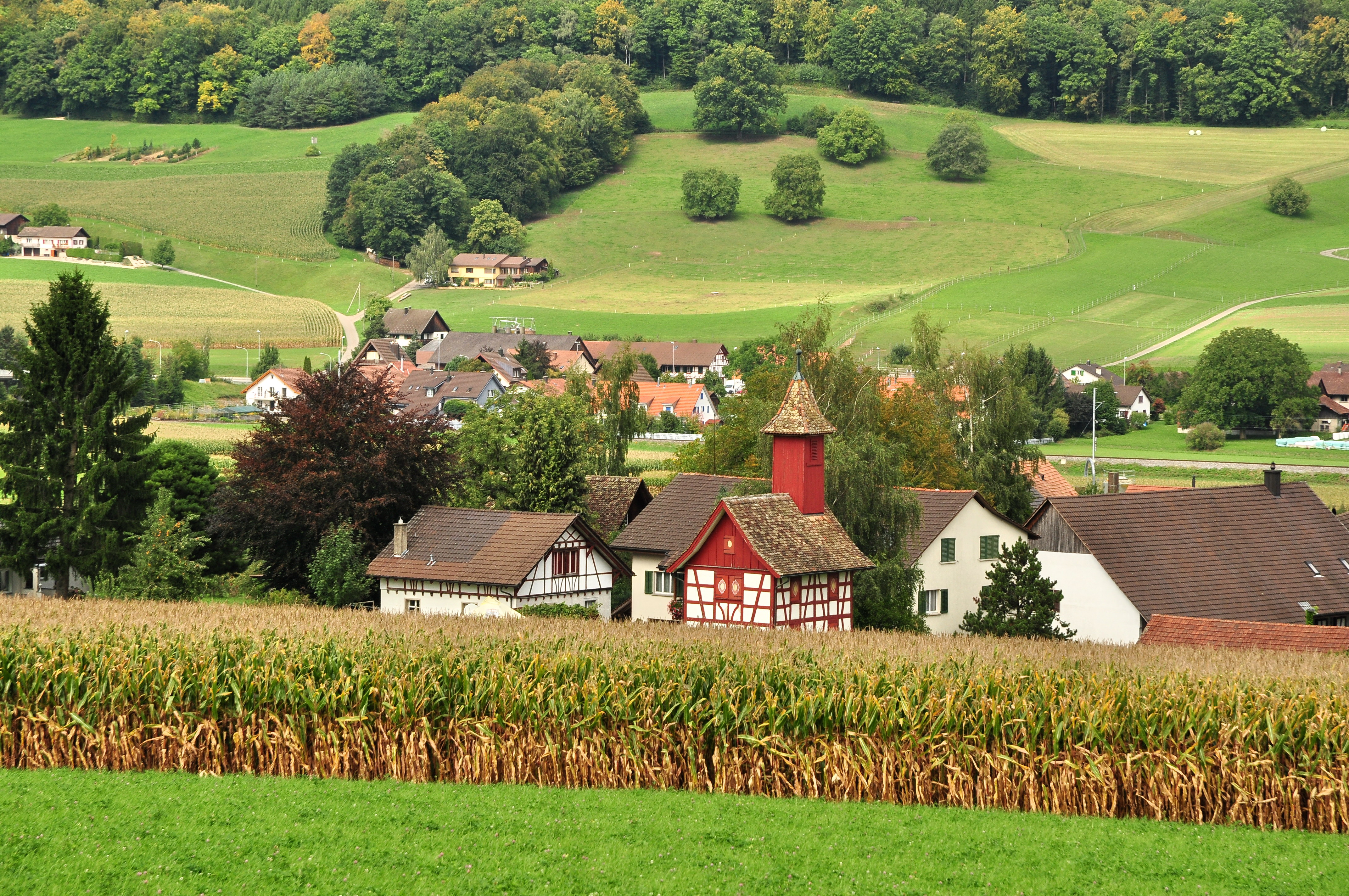 Schleinikon (Switzerland)